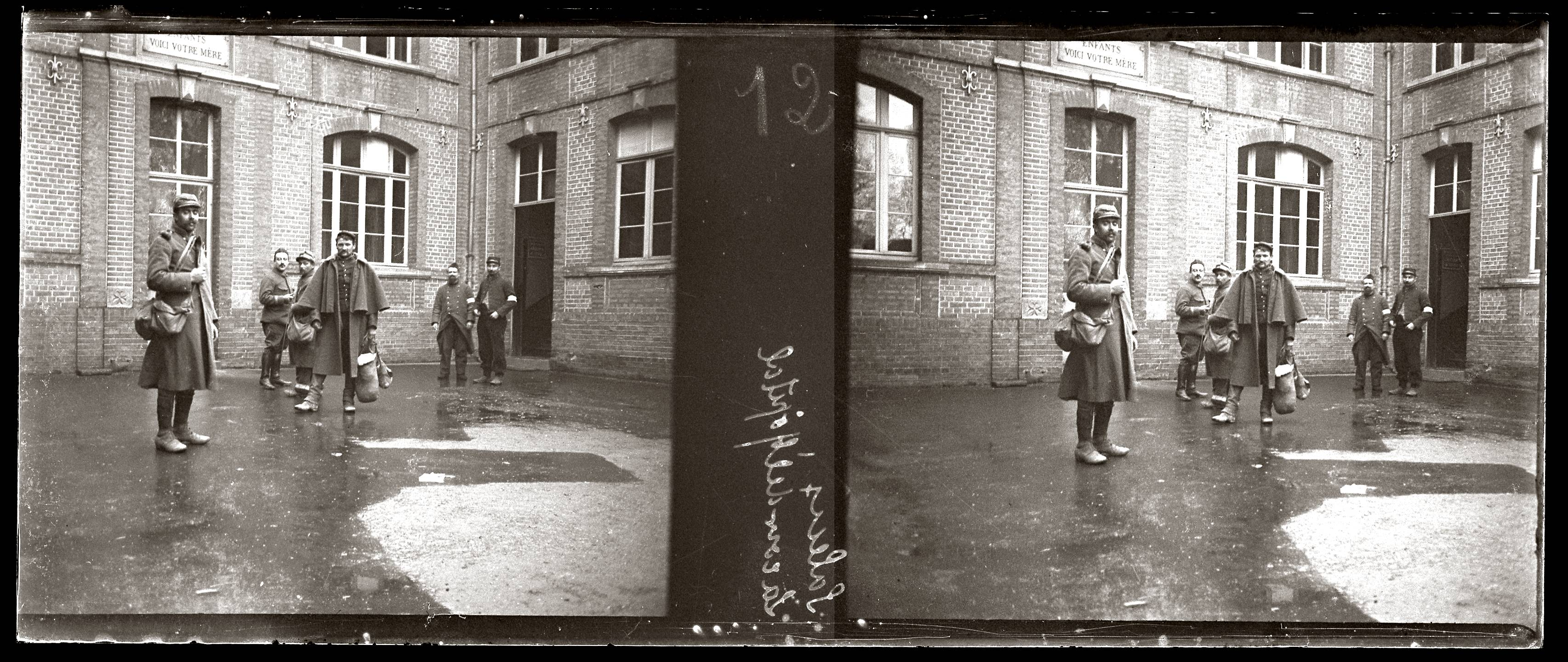 Vue de six soldats debout dans la cour de l'hôpital à Saleux (Somme). 1915. Guerre 1914-1918. L'hôpital semble être installée dans une école.